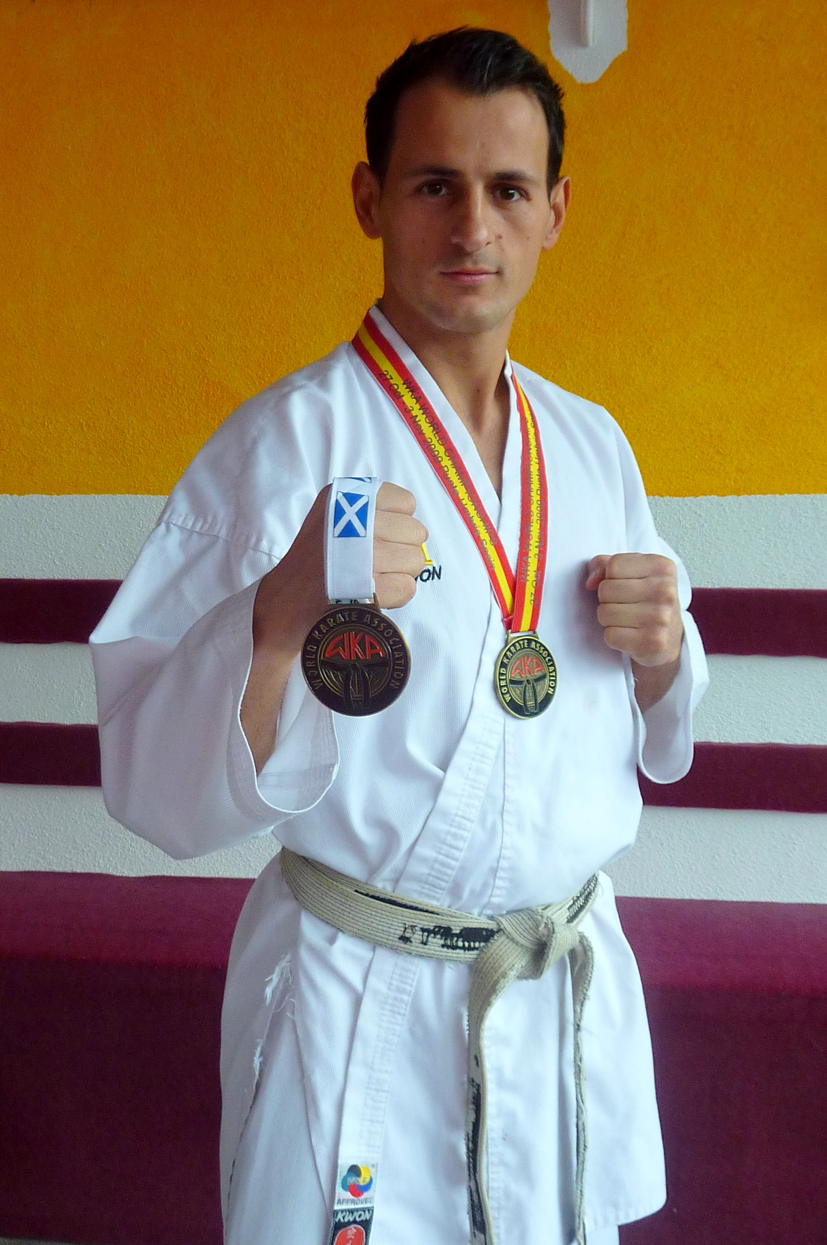 Karateweltmeister Enis Imeri mit zwei Goldmedalien